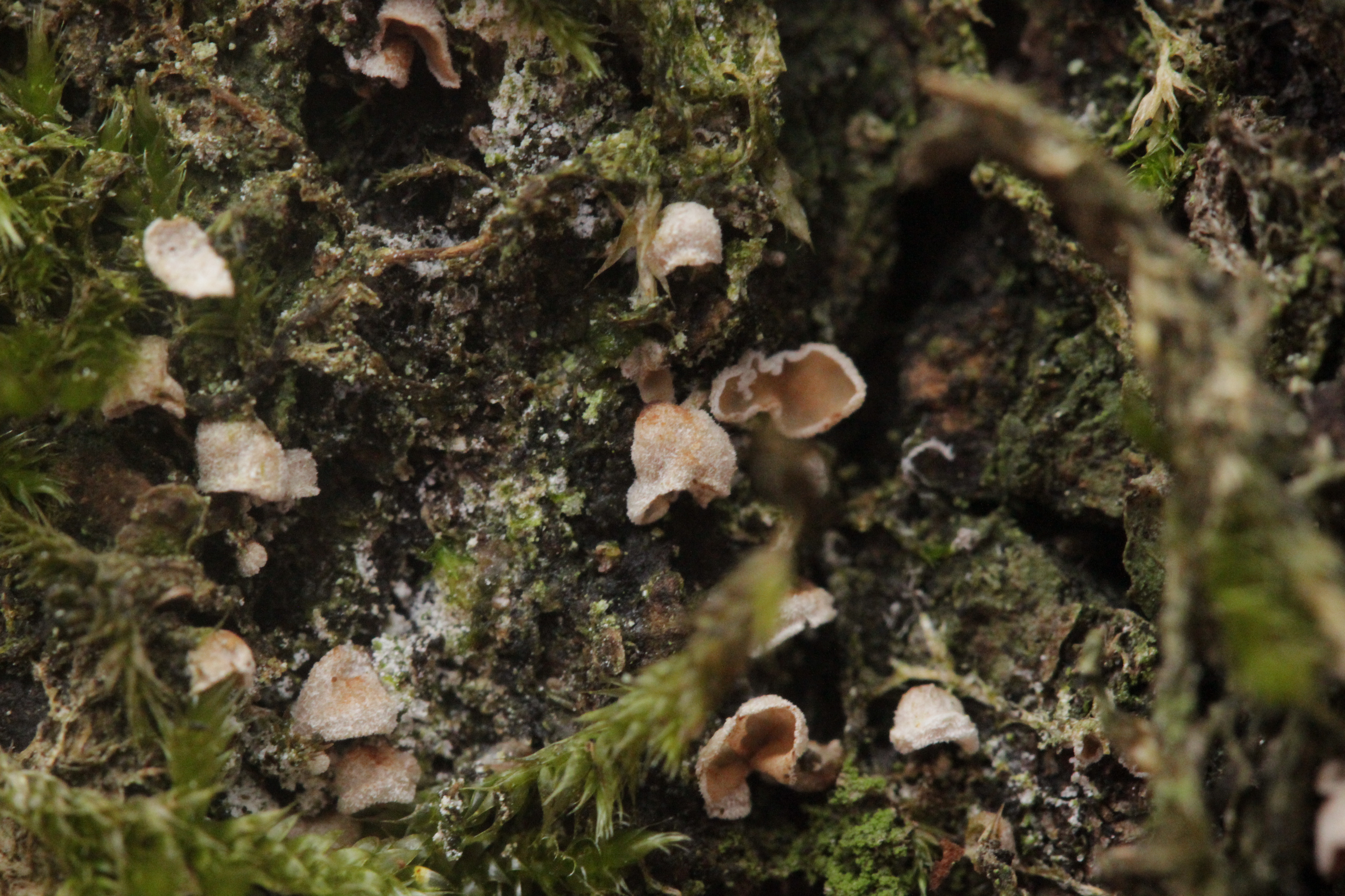 Chromocyphella muscicola